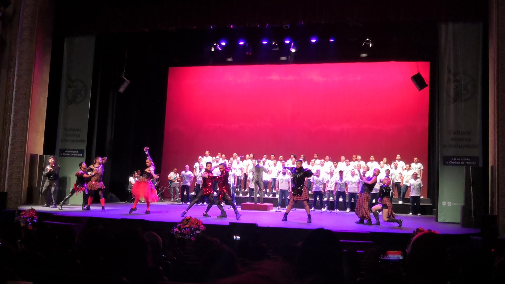 Coro gay en el escenario.